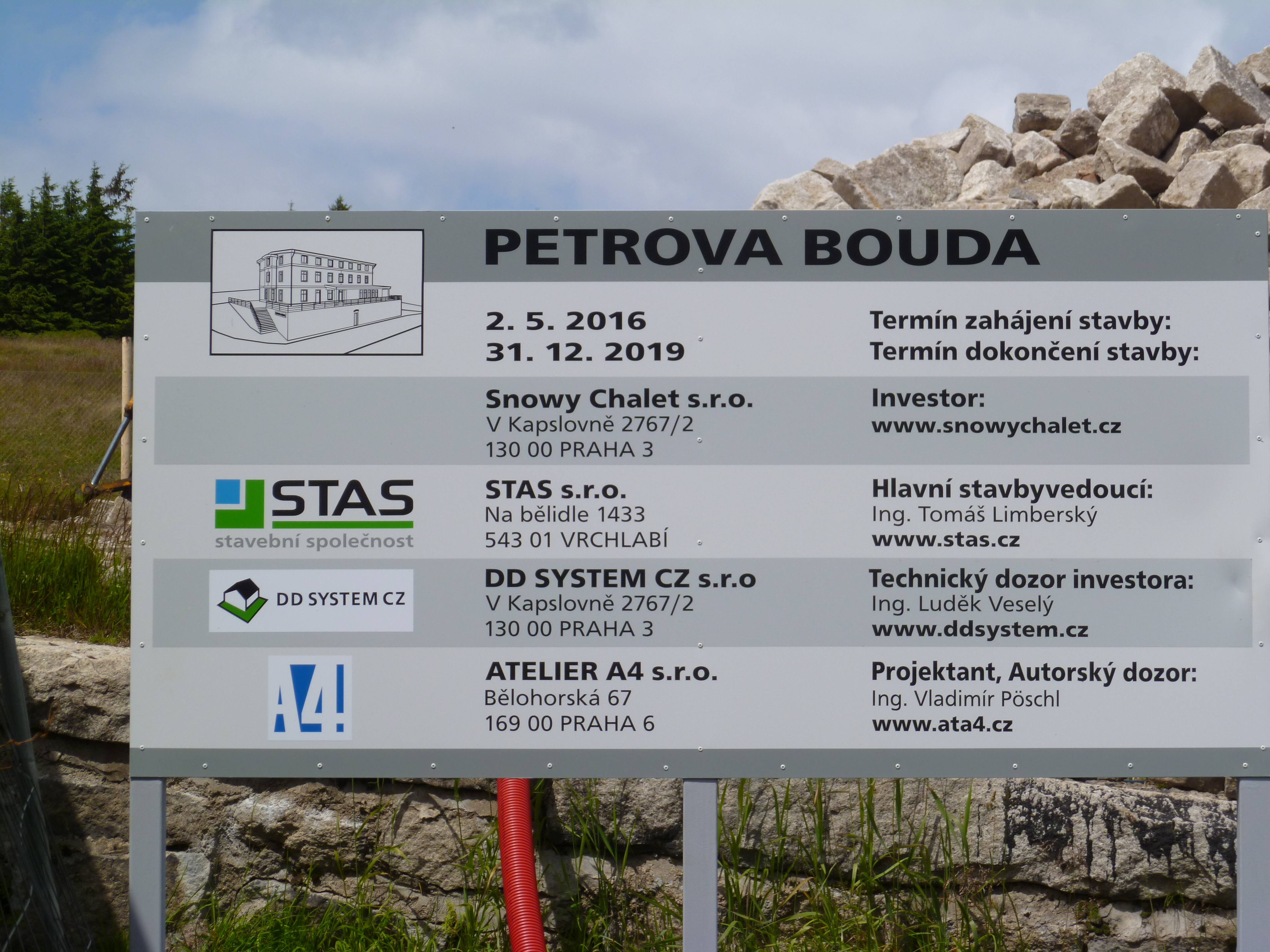 Bautafel